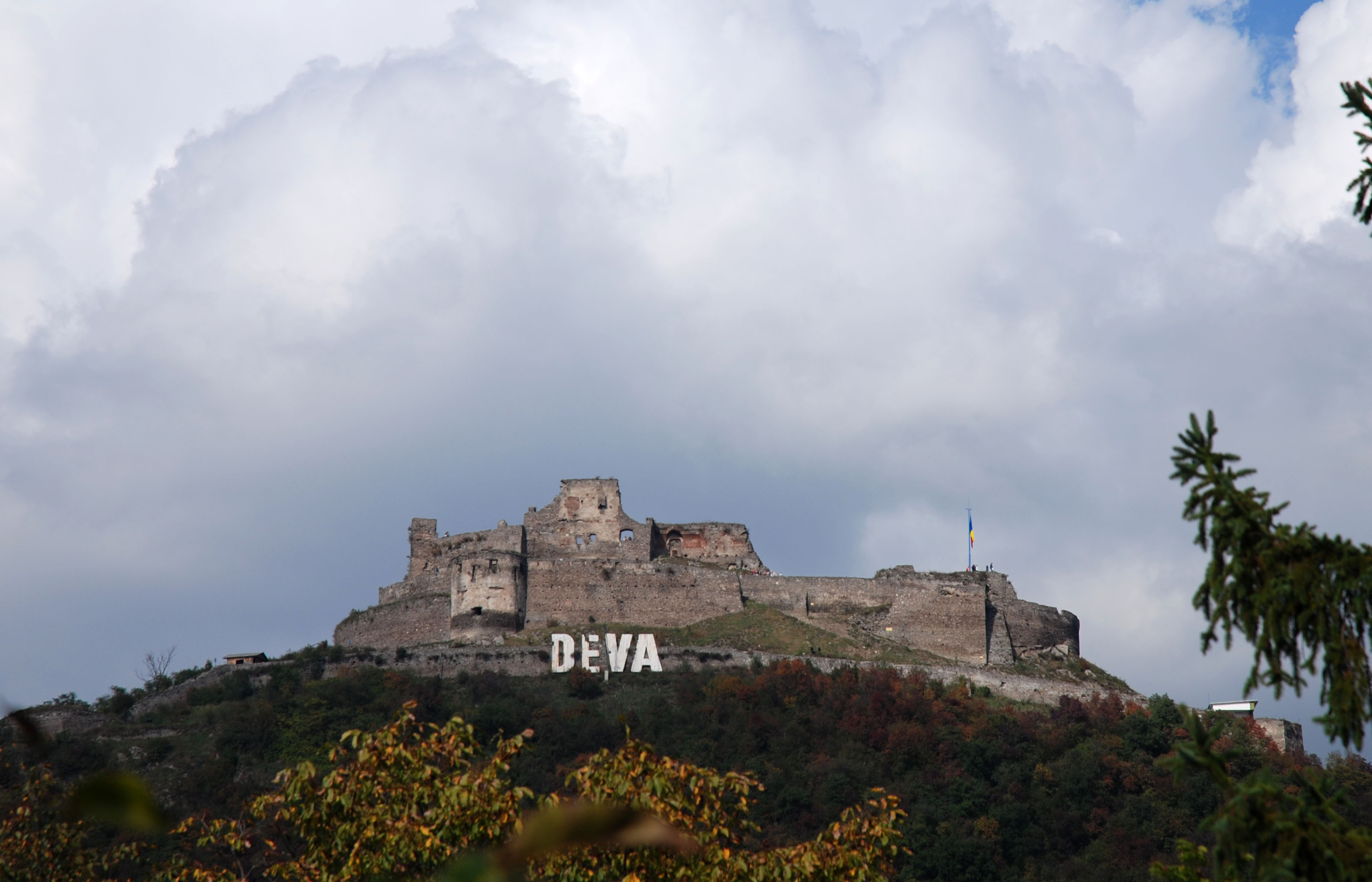 Die Ruinen der Burg von Deva, Rumänien.